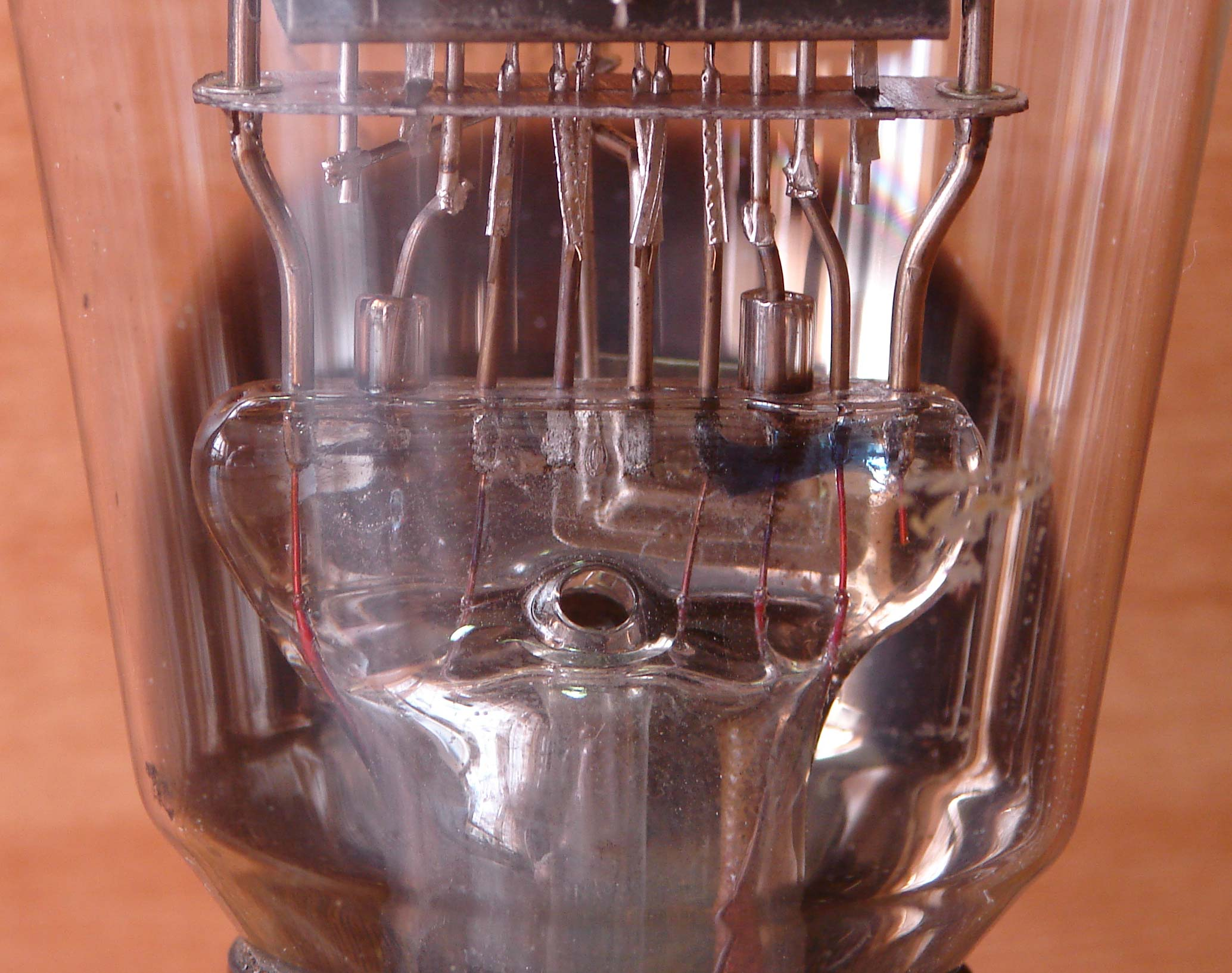 Quetschfussaufbau einer Elektronenröhre AL1